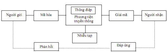 minh họa bài viết